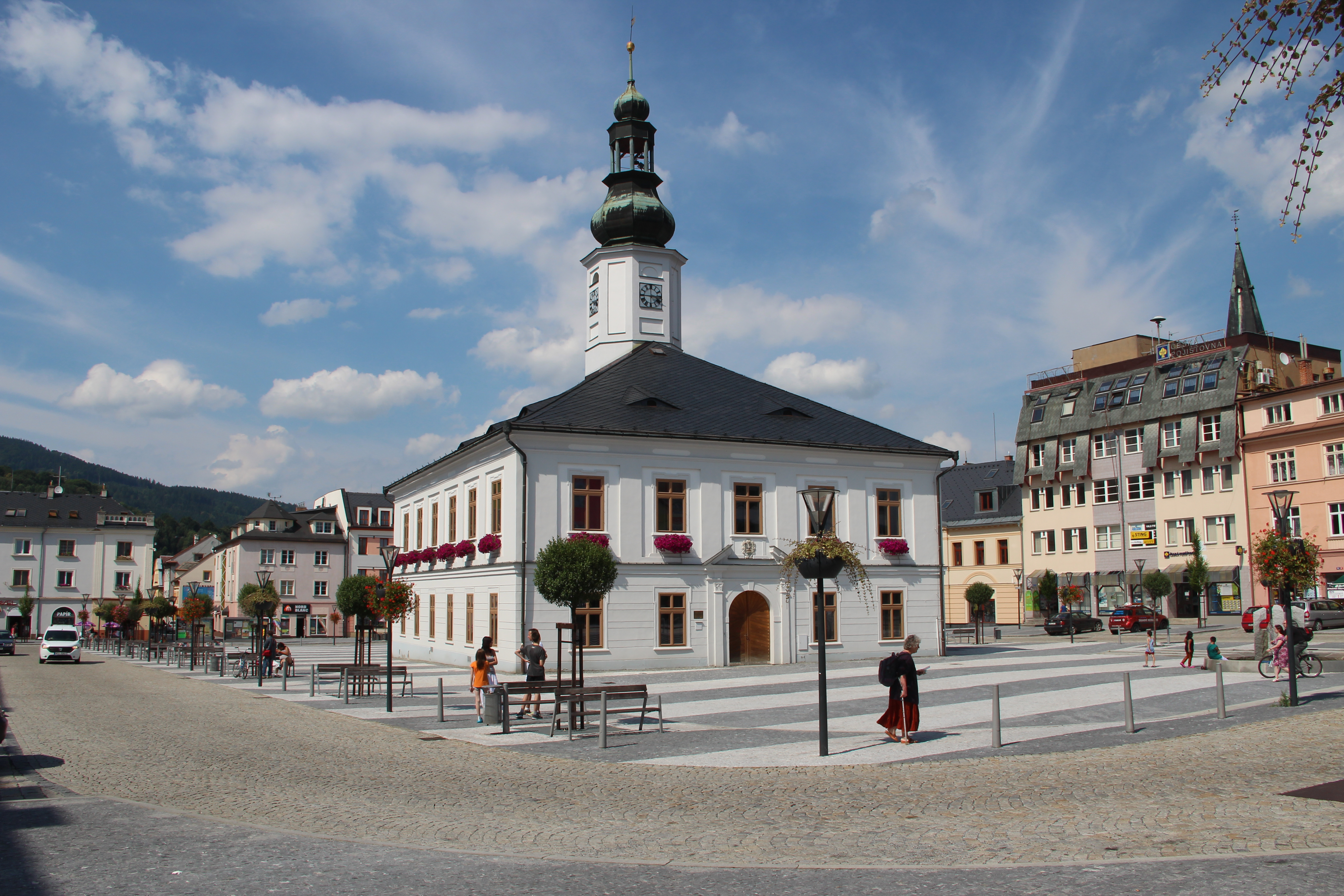 Radnice, Masarykovo náměstí 167/1, Jeseník.